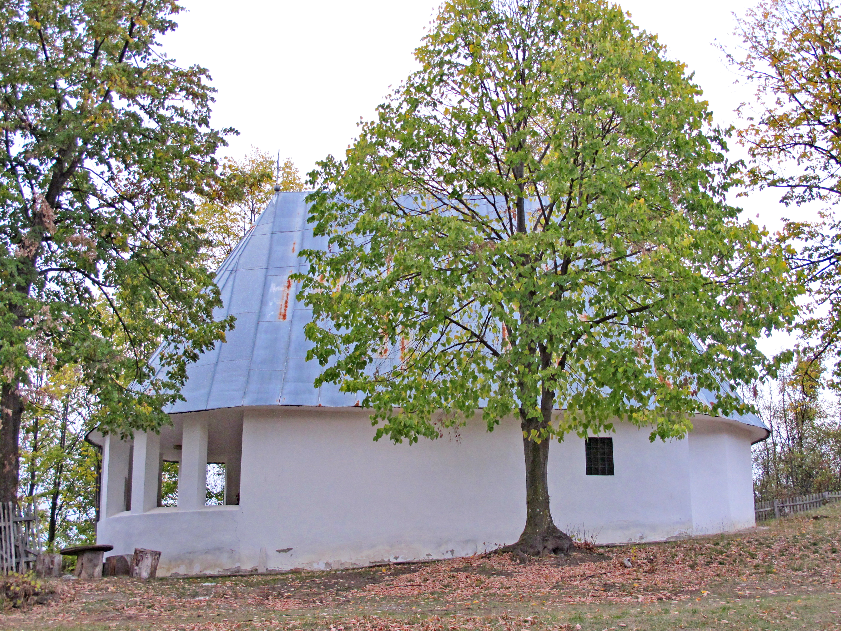 Crkva brvnara u Selencu, Ljubovija, posvecena svetim apostolima Petru i Pavlu. Pretpostavlja se da je podignuta u XIII veku, a obnovljena je 1816. godine.